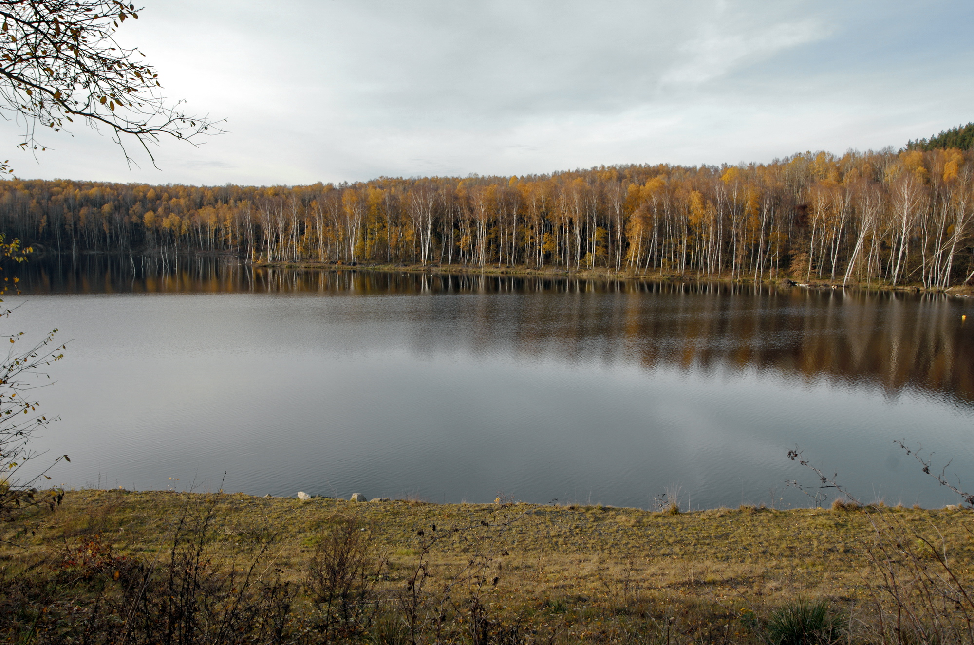 Zatopený bývalý hnědouhelný lom Boží Požehnání v Dolních Pochlovicích, geocelek Chebská pánev, okres Sokolov